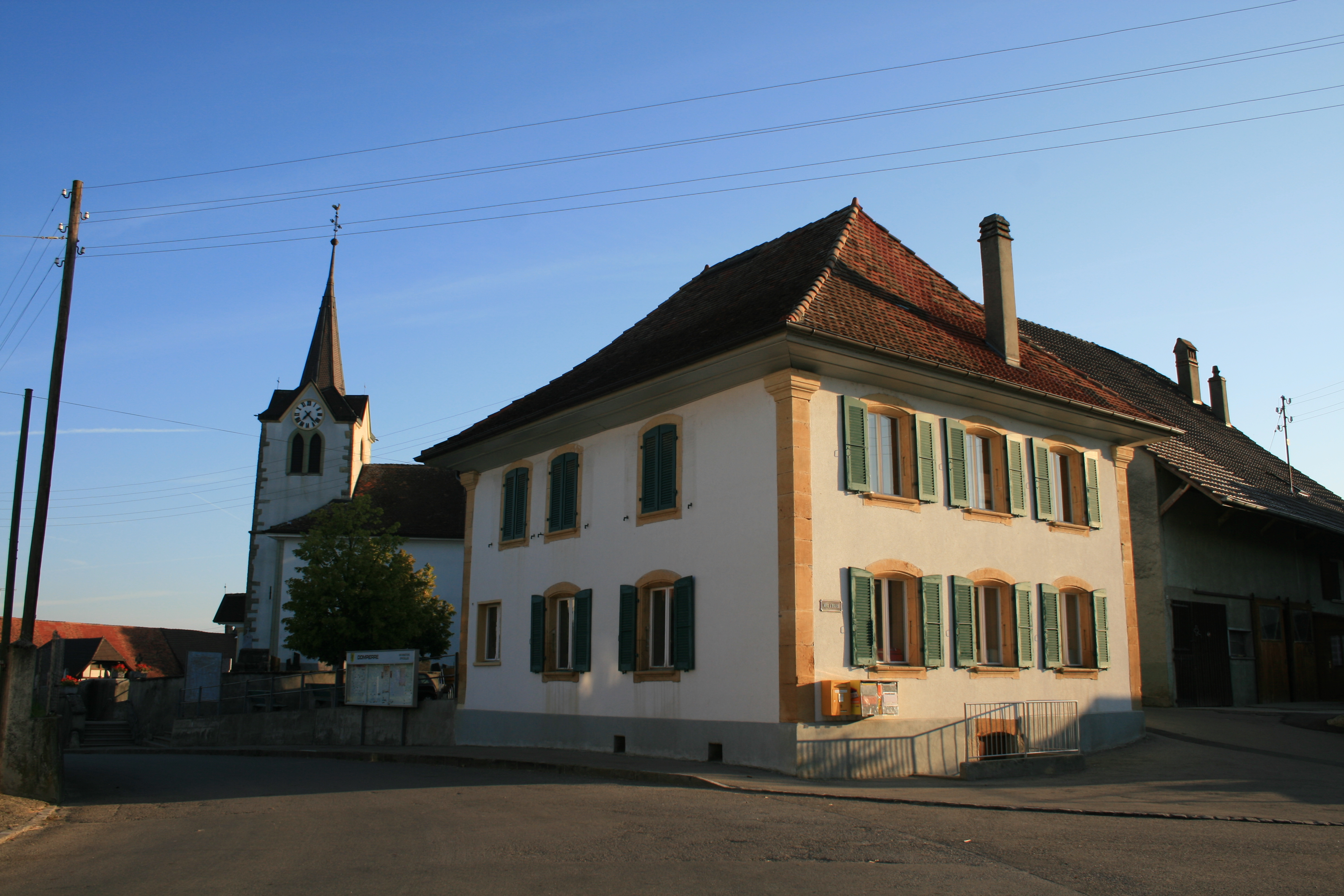 Dompierre FR, Schweiz